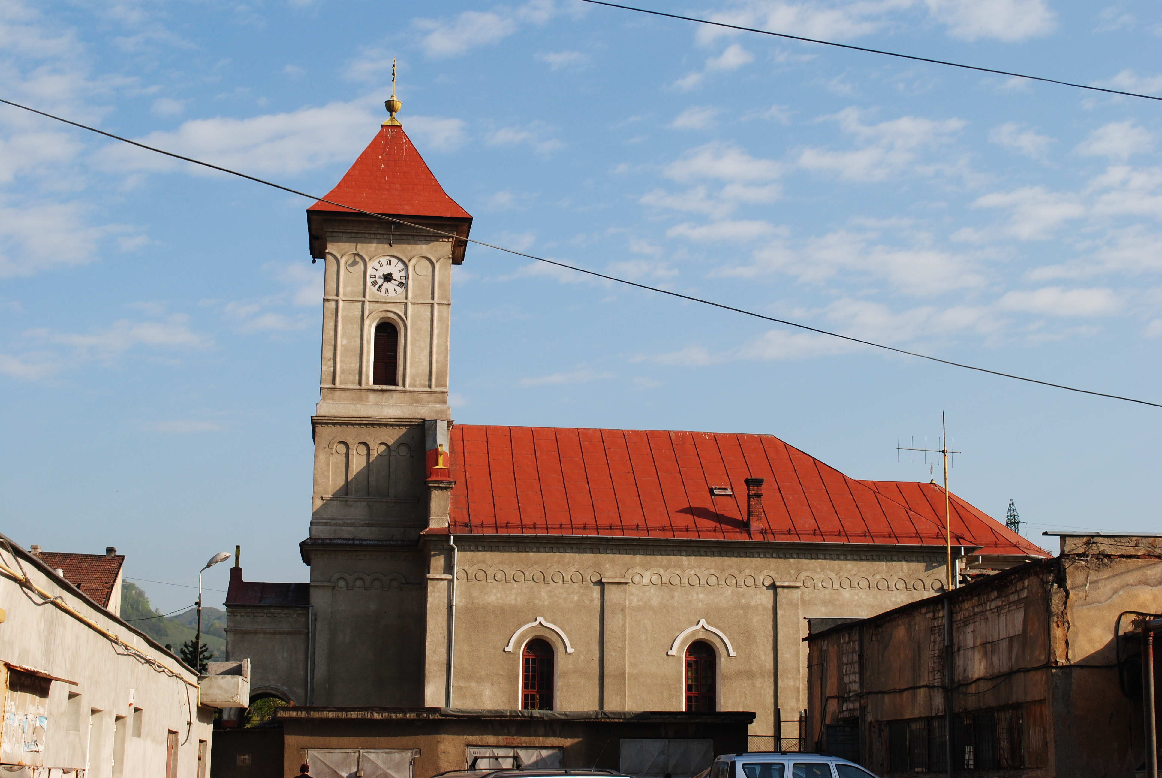 Centrul istoric al orașului, sf. sec. XIX